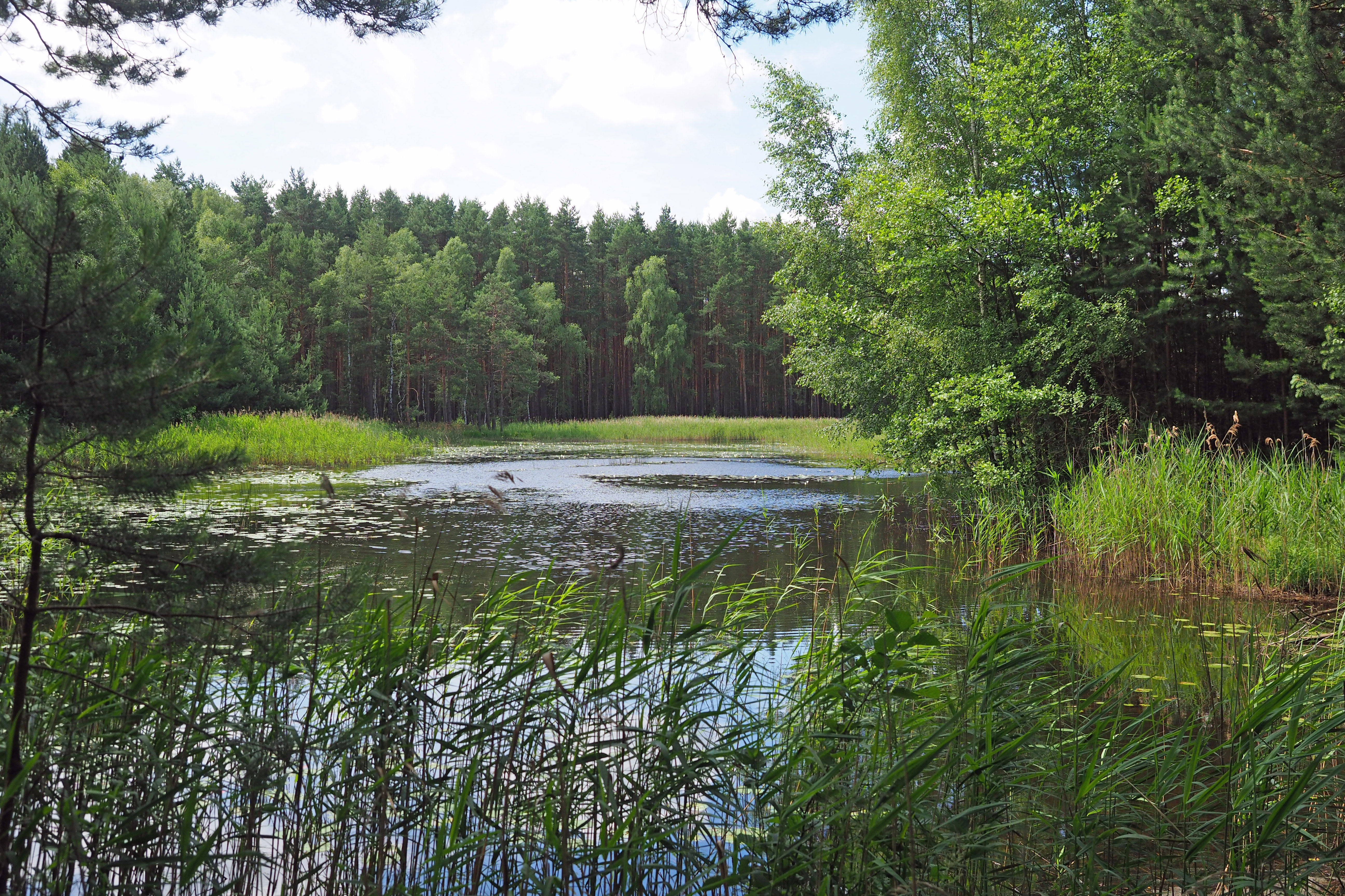 Naturschutzgebiet Erlenbruch-Oberbusch Grüngräbchen, Schwarzteich